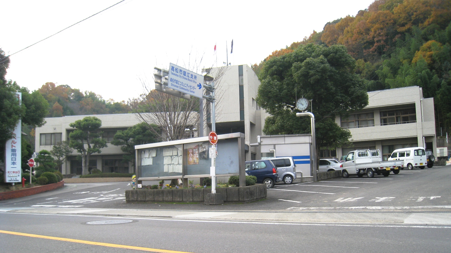 香川県の高松市役所塩江支所。